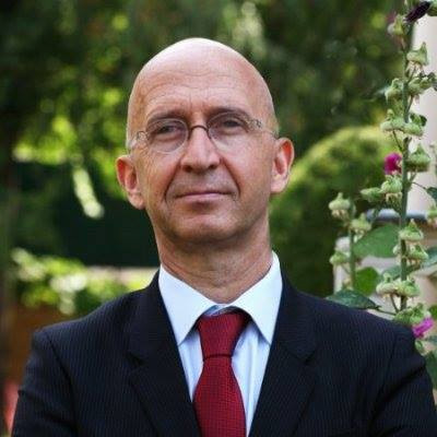 Homme politique Philippe Gustin